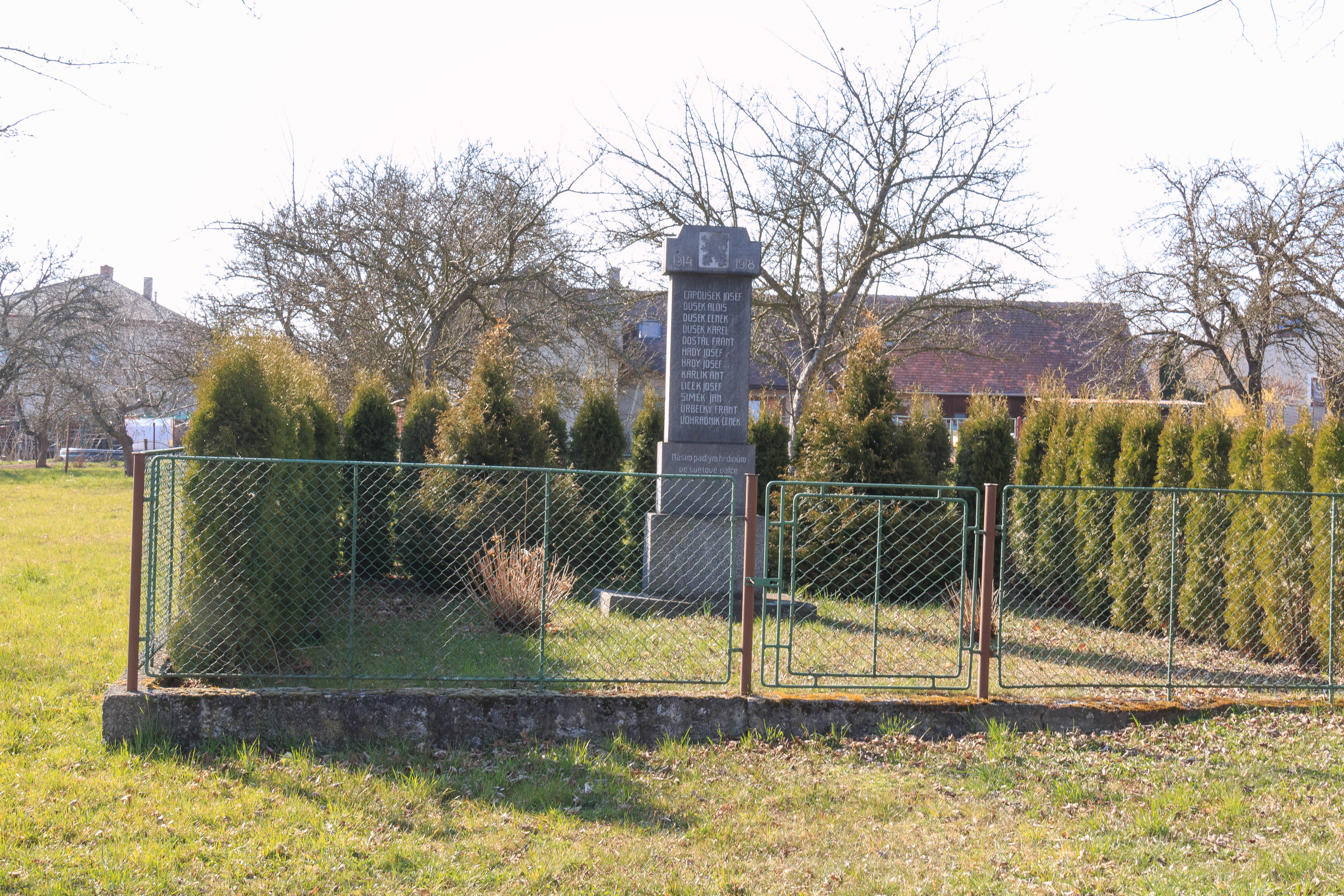 Bošov pomník padlých